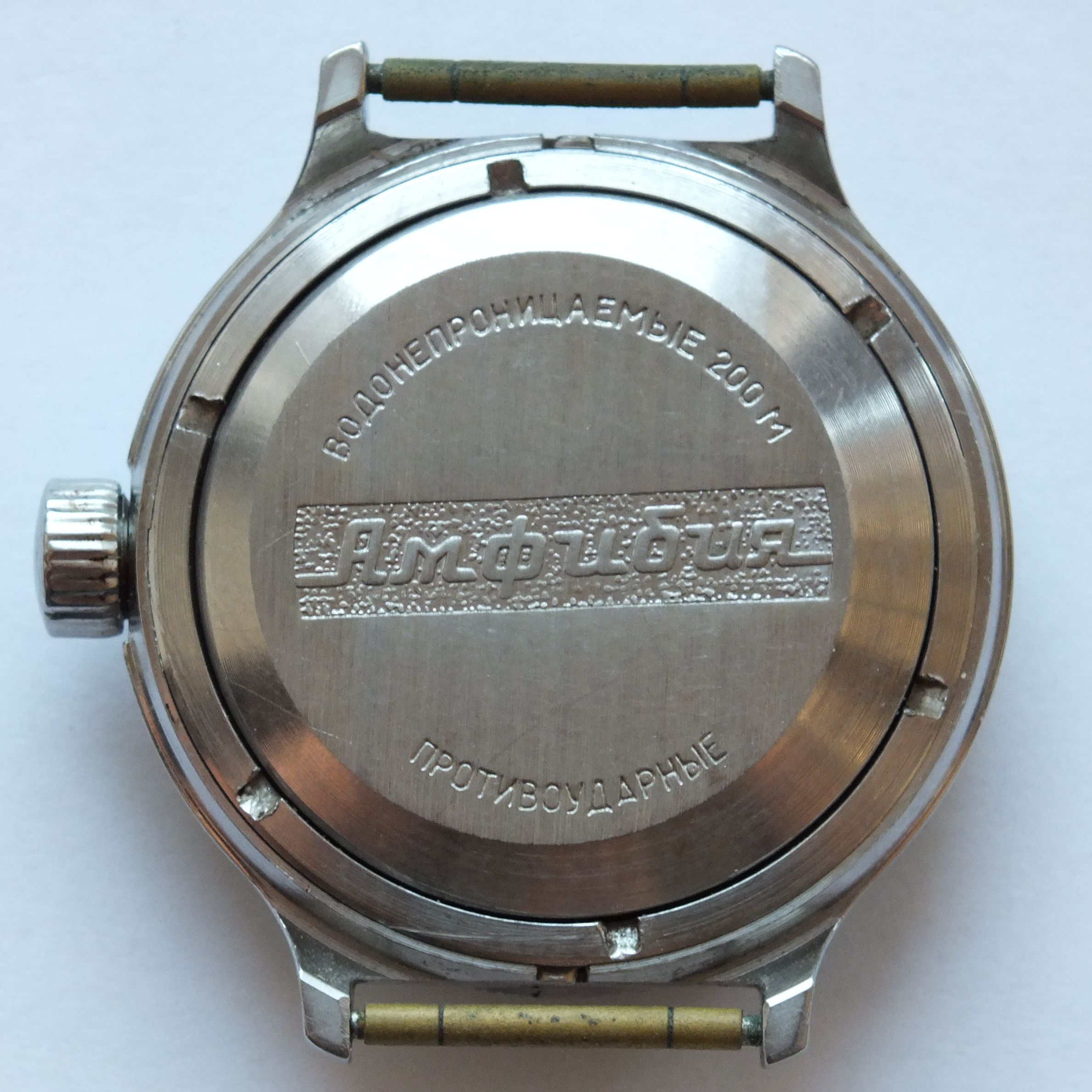 Vostok (watch)